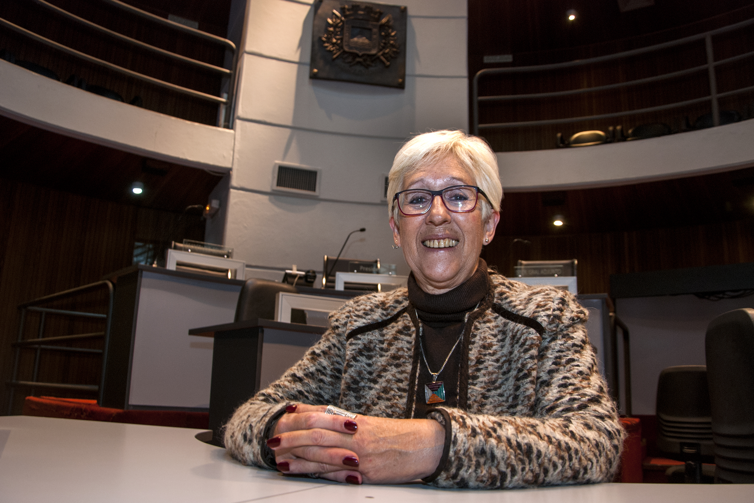 Graciela Villar, presidenta de la Junta Departamental de Montevideo para el periodo 2017 - 2018. Fotografía de 2017.